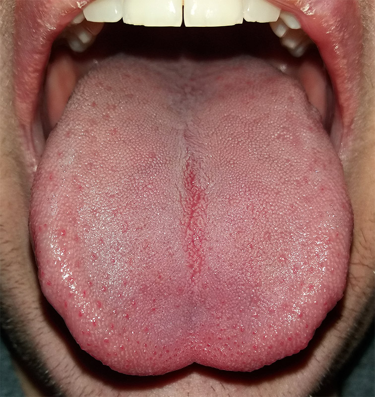 آلت گوشتی که دردهان است و برای چشیدن و بلعیدن و گفتار استعمال میشود و لفظ عربیش لسان است